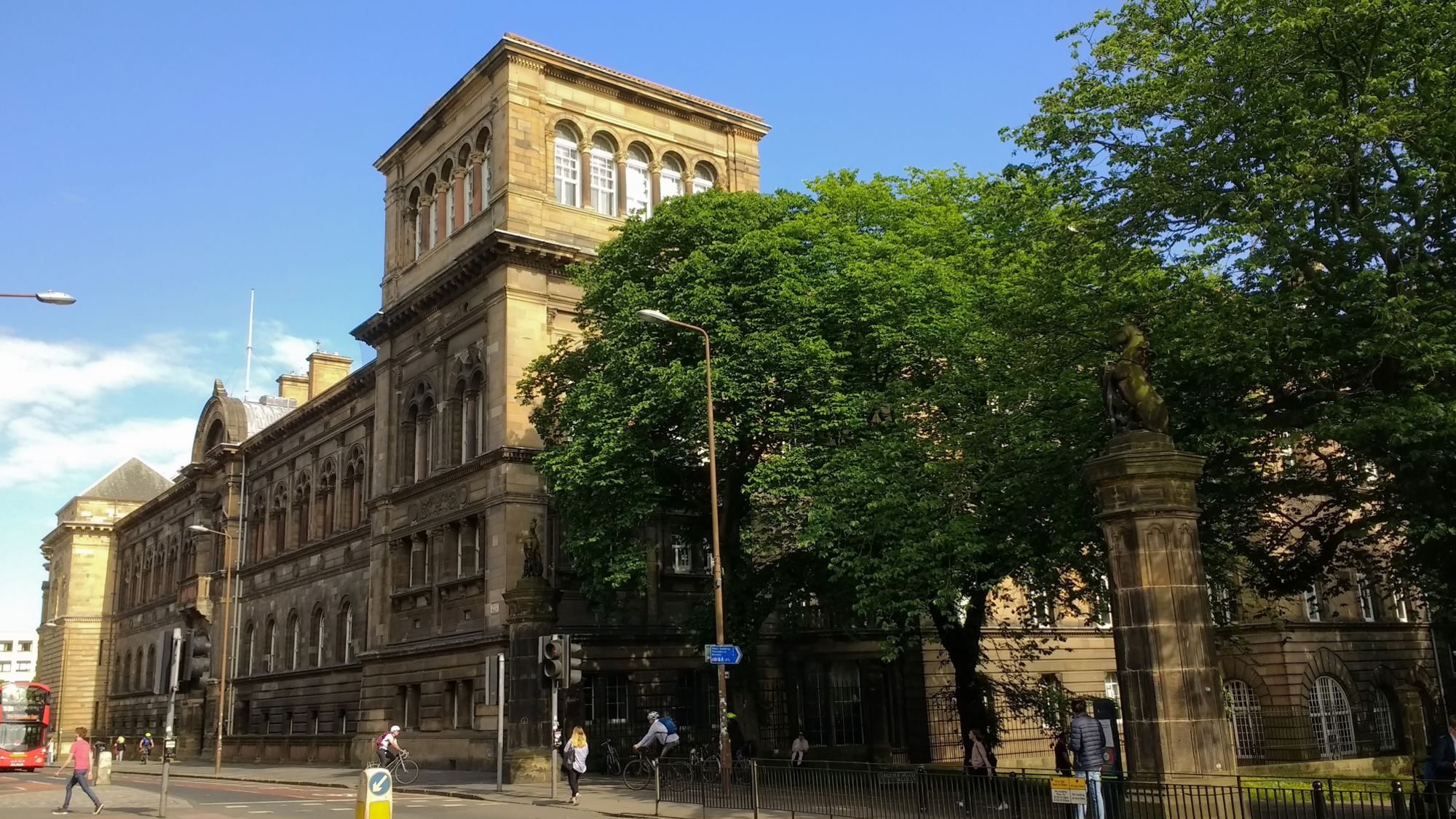 Die old Medical School der University of Edinburgh